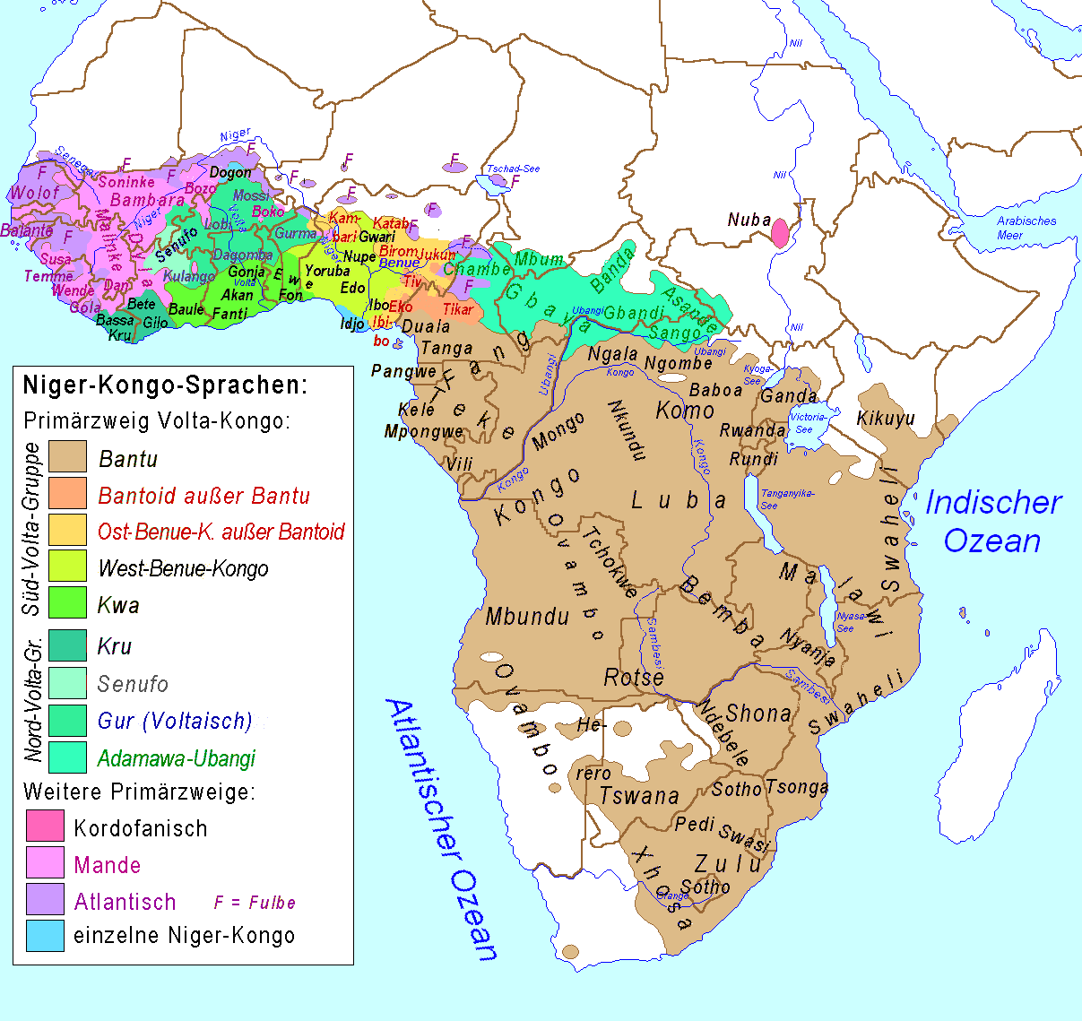 Map of the Niger-Congo-languages und Khoi-San-languages in Afrika / Karte der Niger-Kongo-Sprachen und Khoisan-Sprachen in Afrika